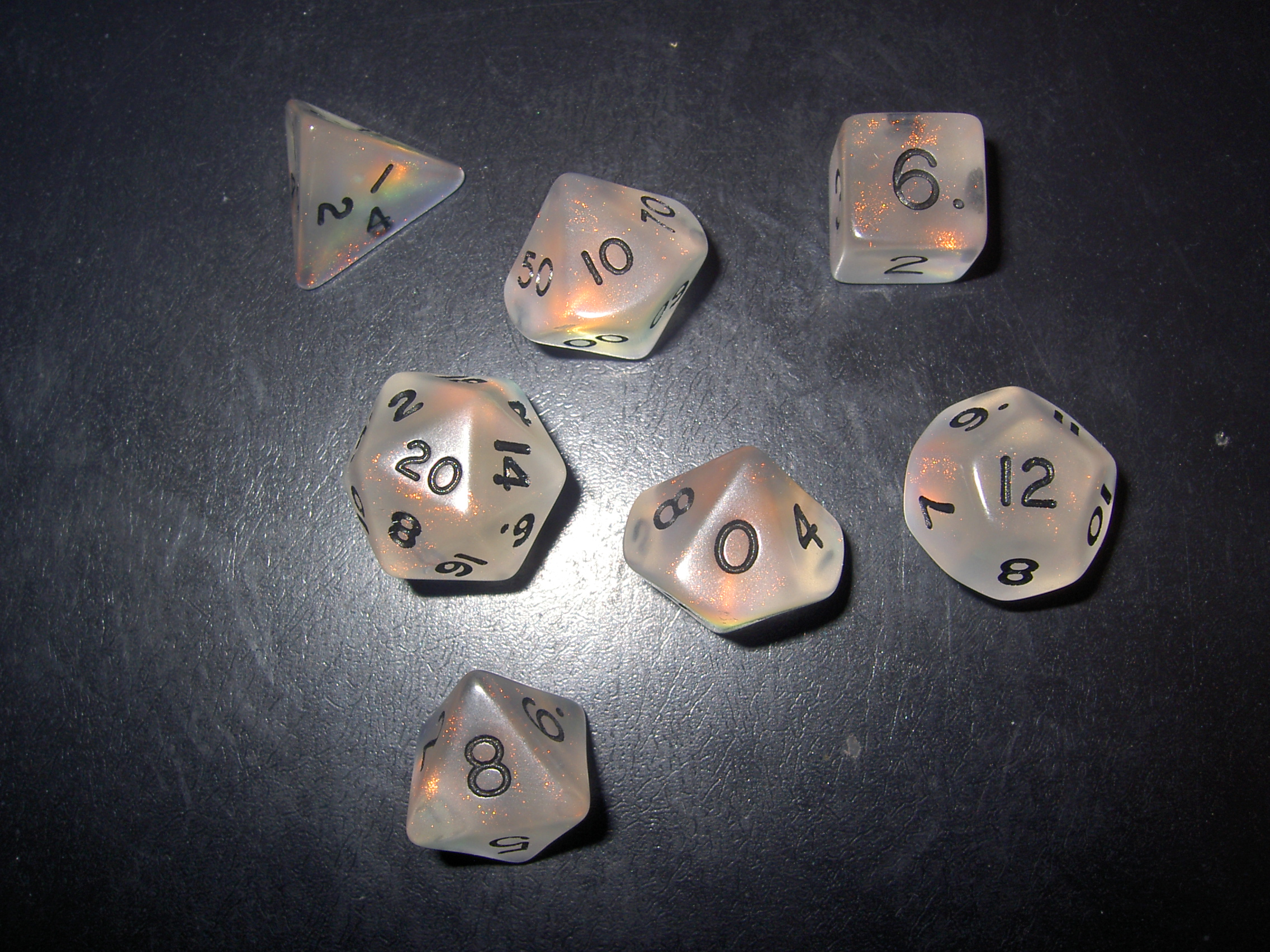 Dados para RPG do sistema D20. Dados do tipo Moonstone (Brilham na radiação ultravioleta (Luz Negra)